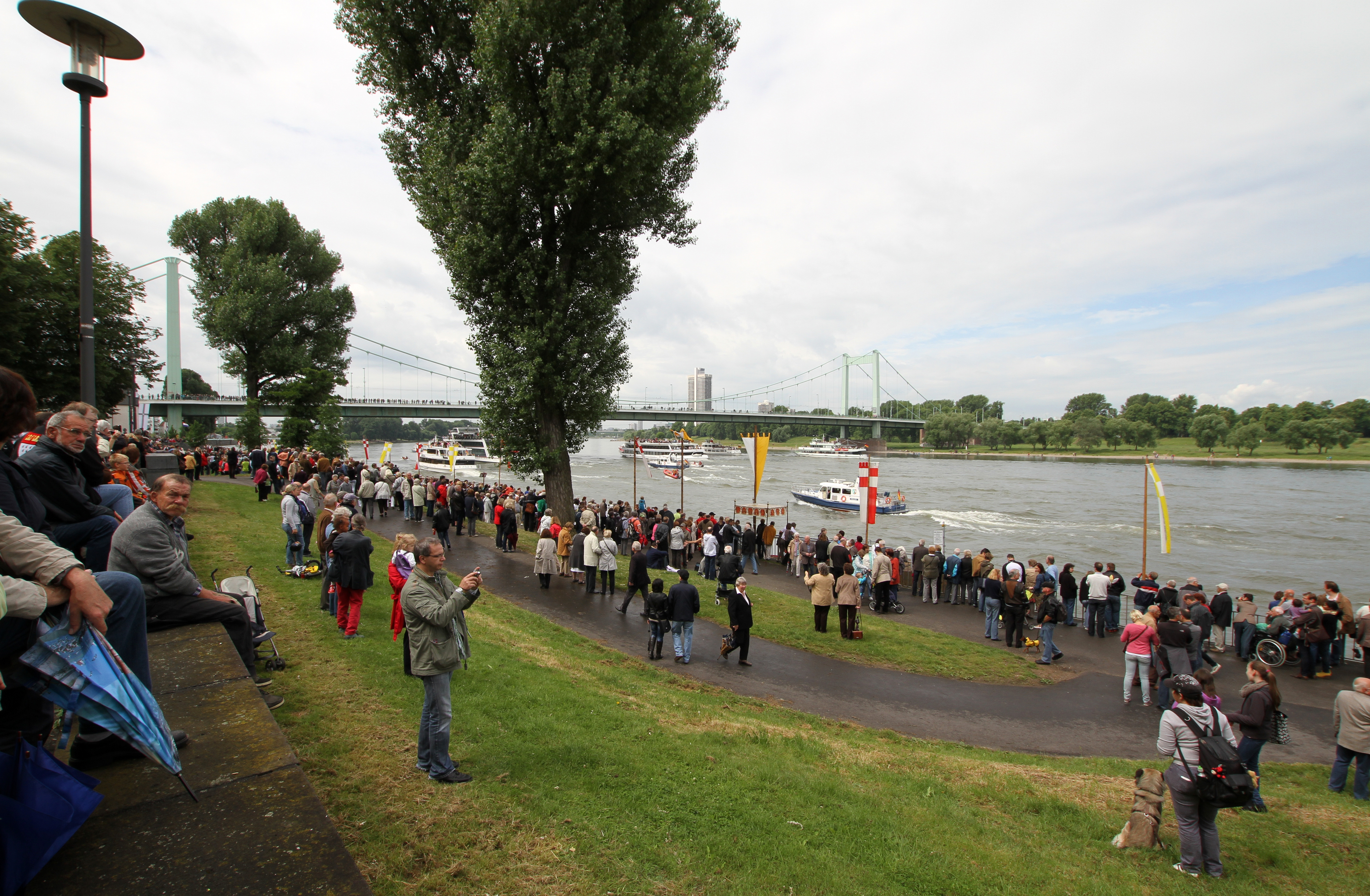 Köln-Mülheim, Mülheimer Gottestracht 2012. Schiffsprozession vor Sankt Clemens